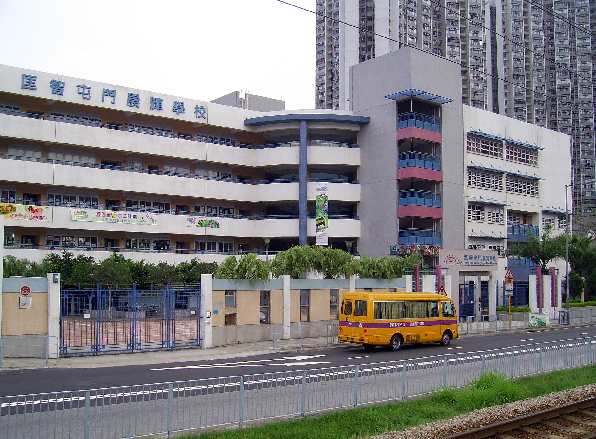 中文（香港）: 匡智屯門晨輝學校